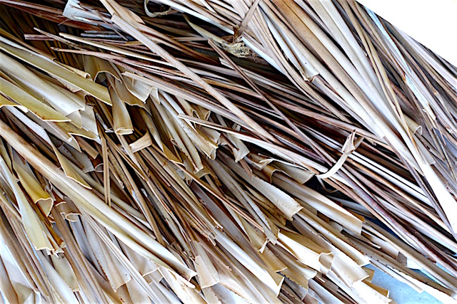 Utilisation des feuilles de bakoua pour la confection de chapeaux par exemple